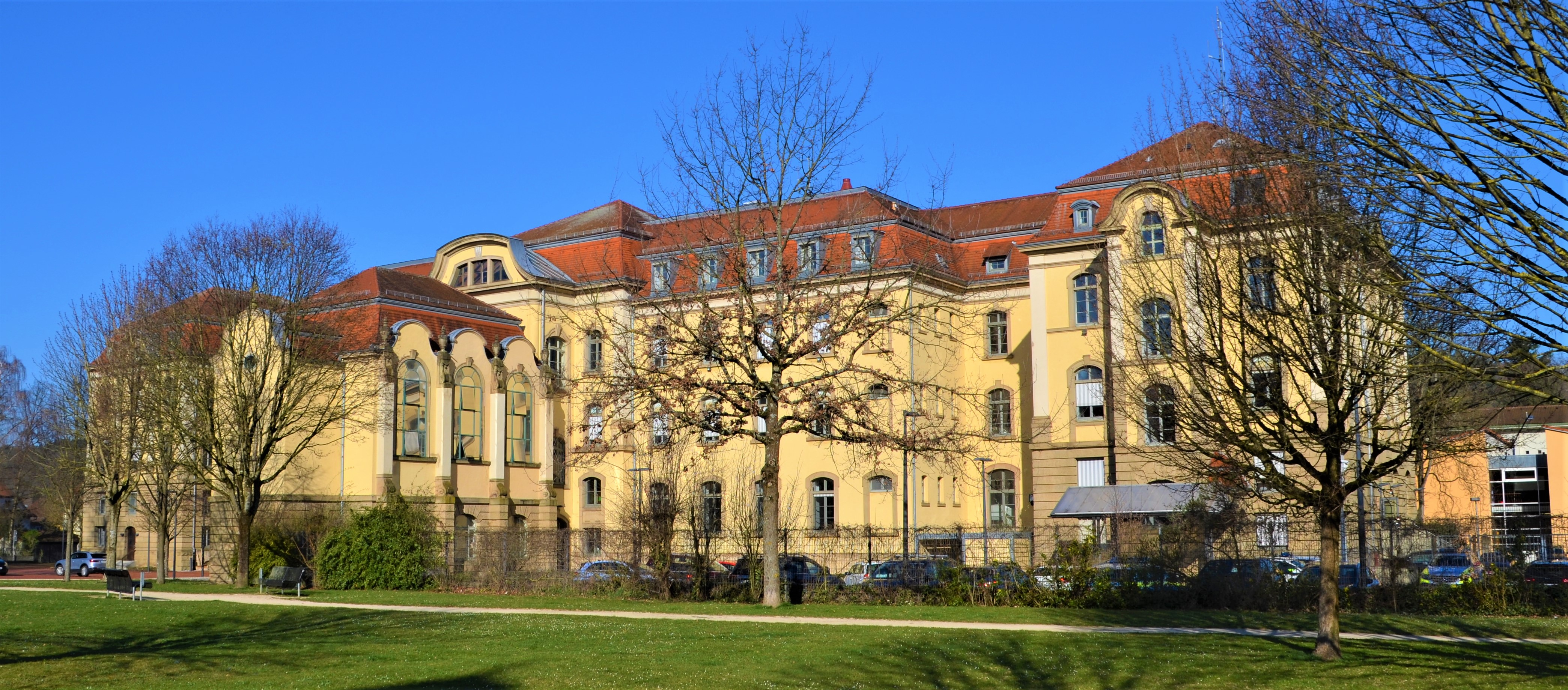 Alte PH aus dem davorliegenden Park von Südosten aufgenommen